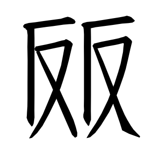 西夏文「脣」，即𗠉 这是我的手写字